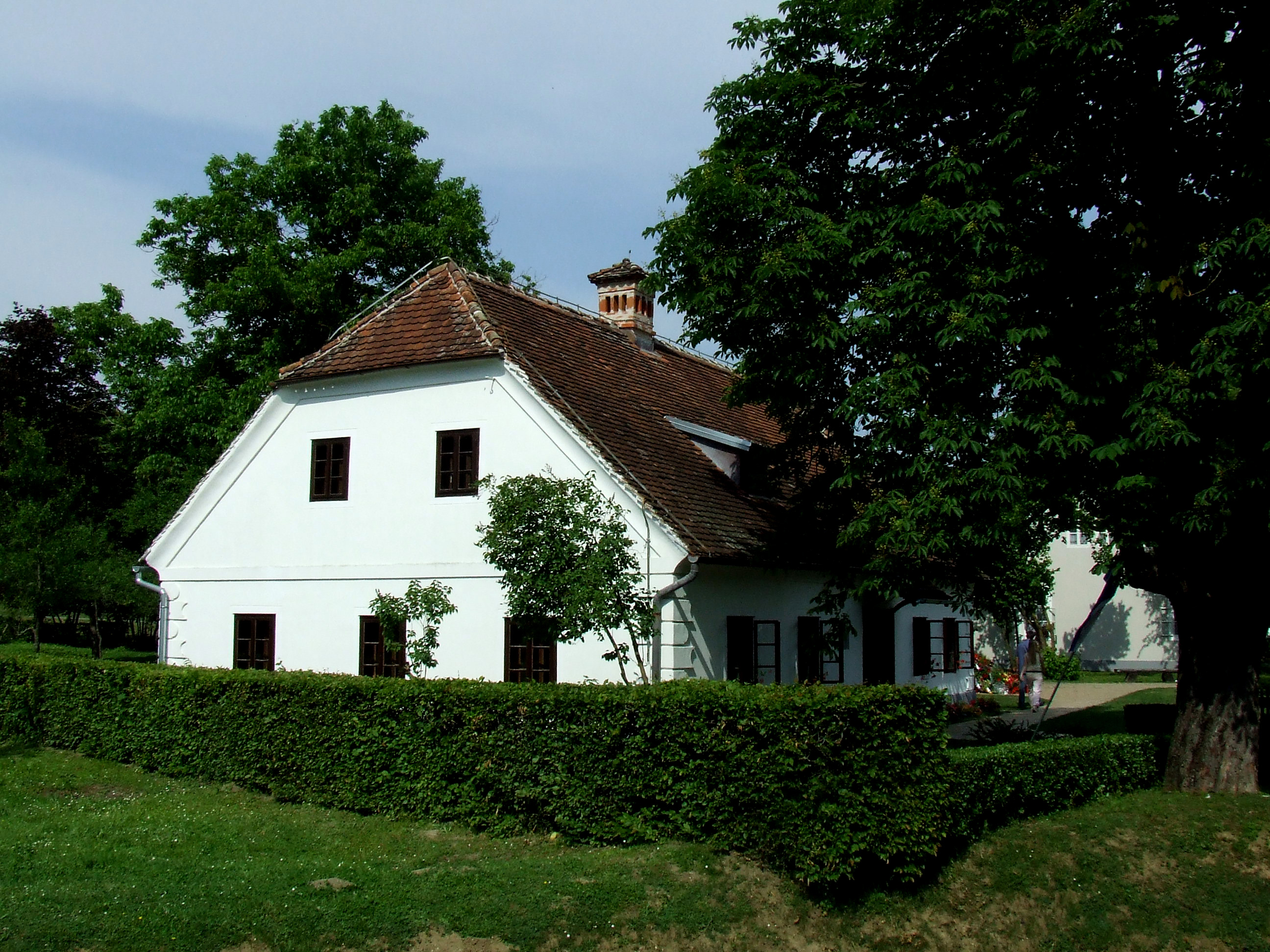 Rojstna hiša Josipa Broza Tita, posneto 26.5.2007 v Kumrovcu. Avtorica Ines Zgonc